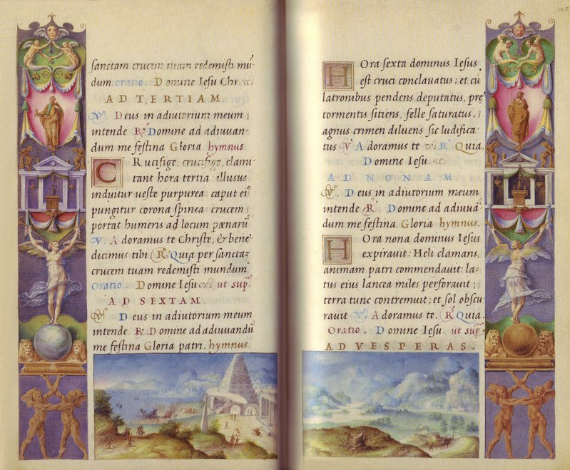 Stundenbuch des Farnese. Miniaturen von Giulio Clovio, Schriftgestaltung von Francesco Monterchi